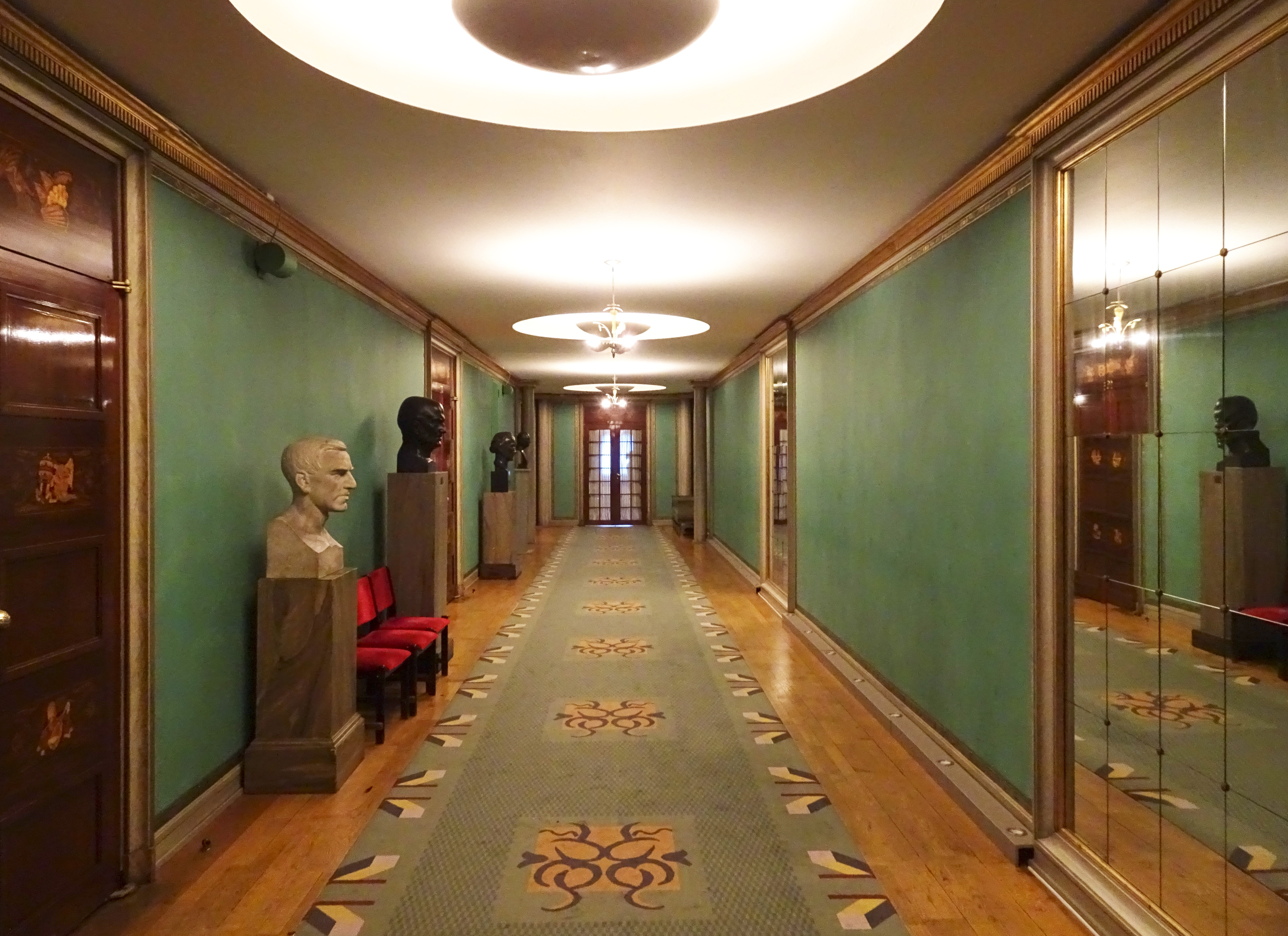 Konserthuset korridor våning 2 trappor